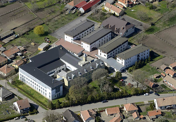 Légi fotó a hajdúdorogi Szent Bazil Oktatási Központról, amely a görögkatolikus egyház kezelésében lévő óvodát, általános iskolát és középiskolát tartalmazza.